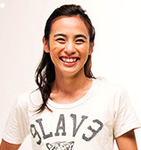 Yukimi Fukuda